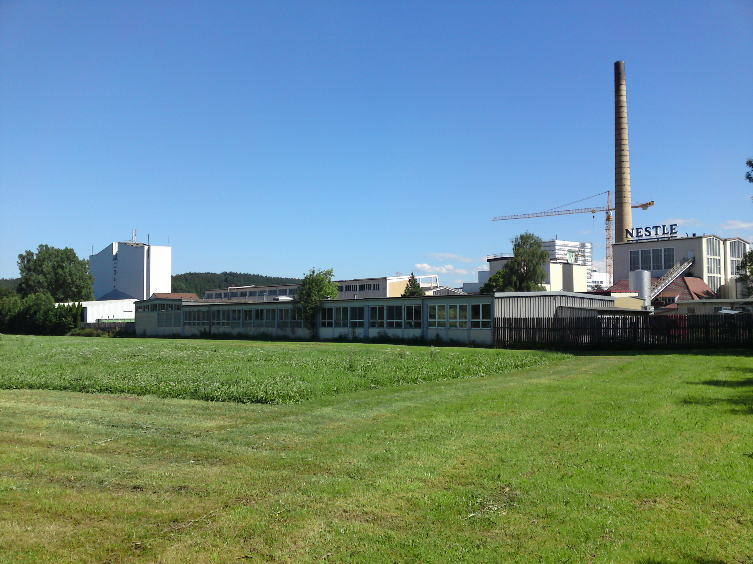 Nestle-Werk für Babynahrung in Biessenhofen